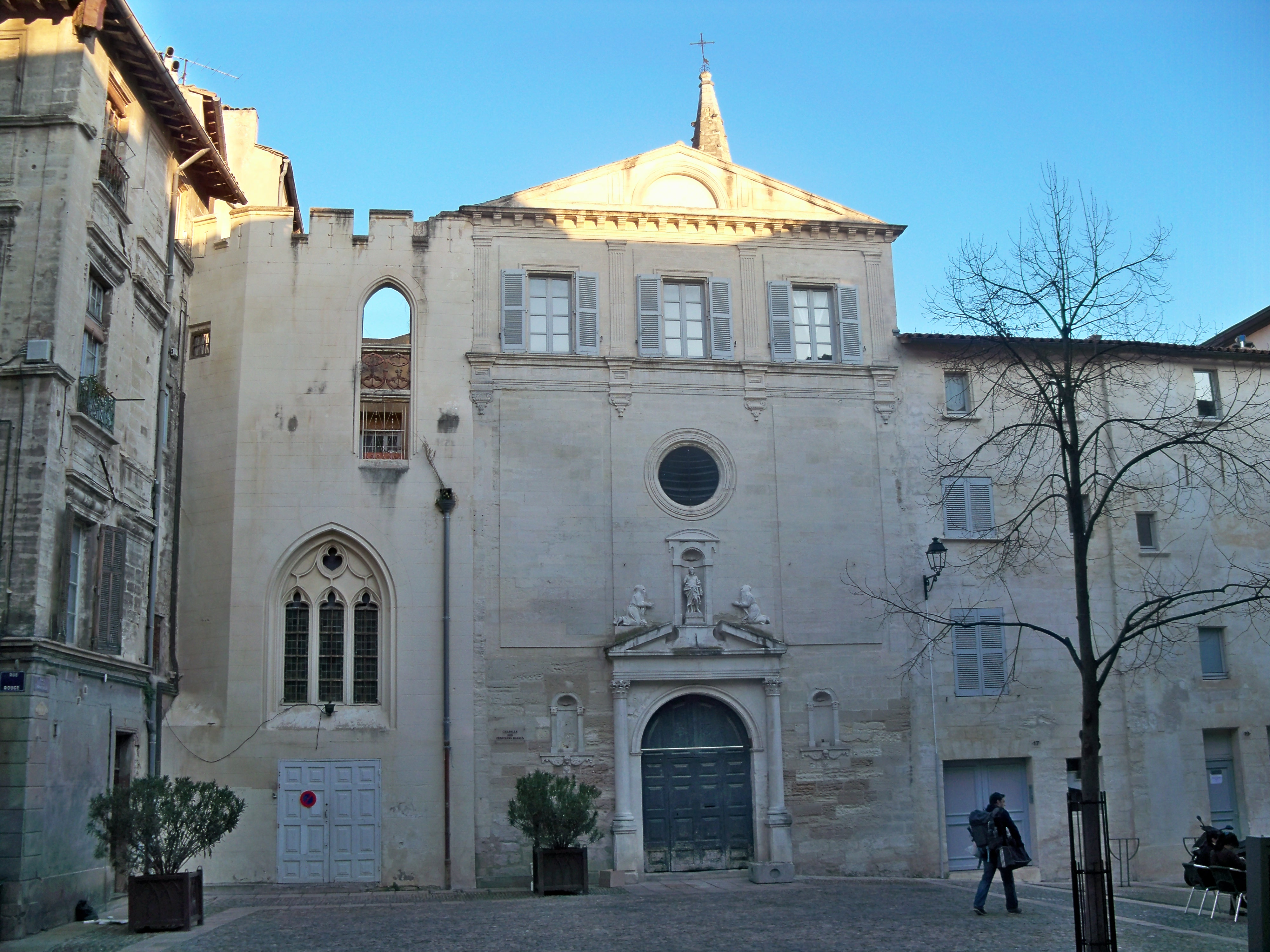 église Notre-Dame-la-Principale d'Avignon